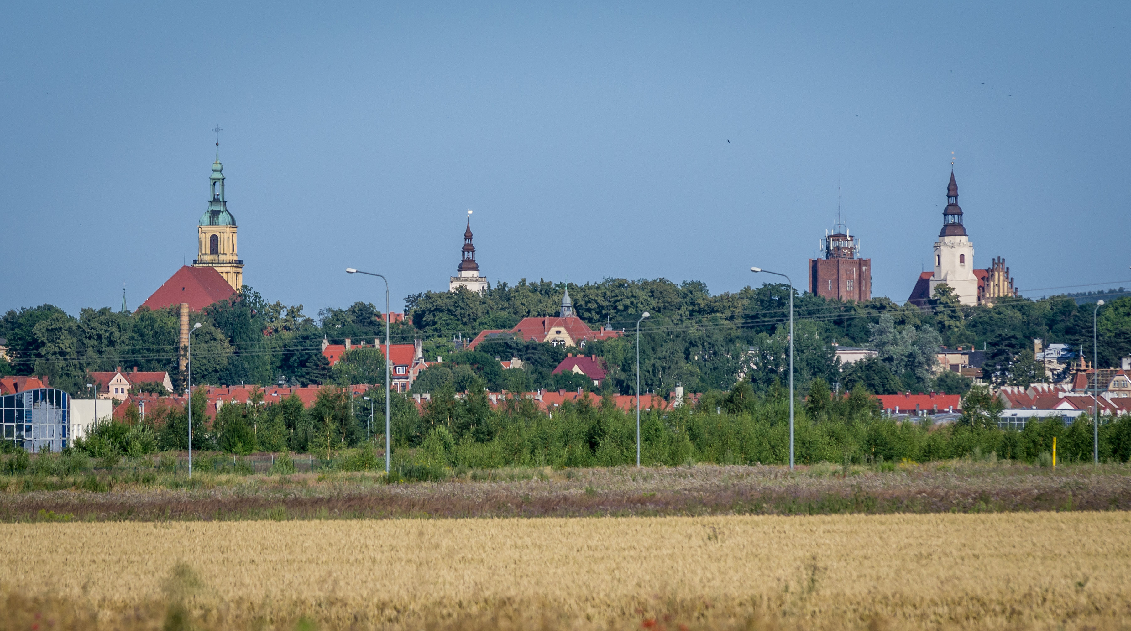 Widok z Pieszyc na Dzierżoniów This photo of Lower Silesian Voivodeship was taken during Wikiexpedition 2013 set up by Wikimedia Polska Association. You can see all photographs in category Wikiekspedycja 2013.